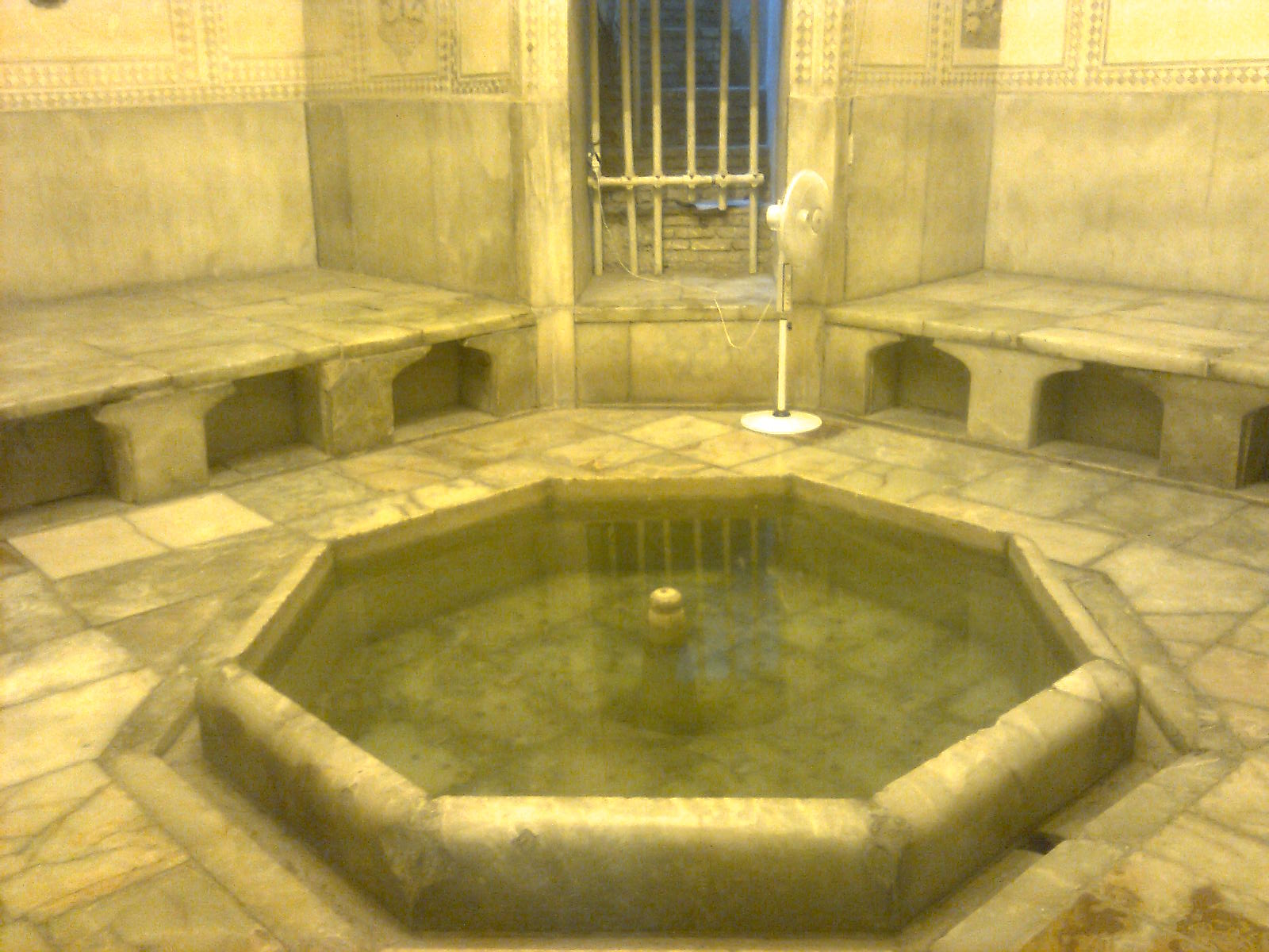 ارگ کریمخانی